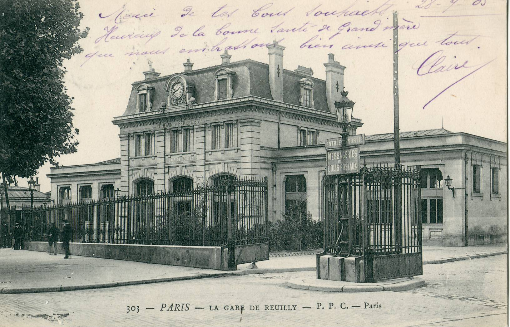 Carte postale ancienne éditée par P.P.C. N°303 Paris : La Gare de Reuilly